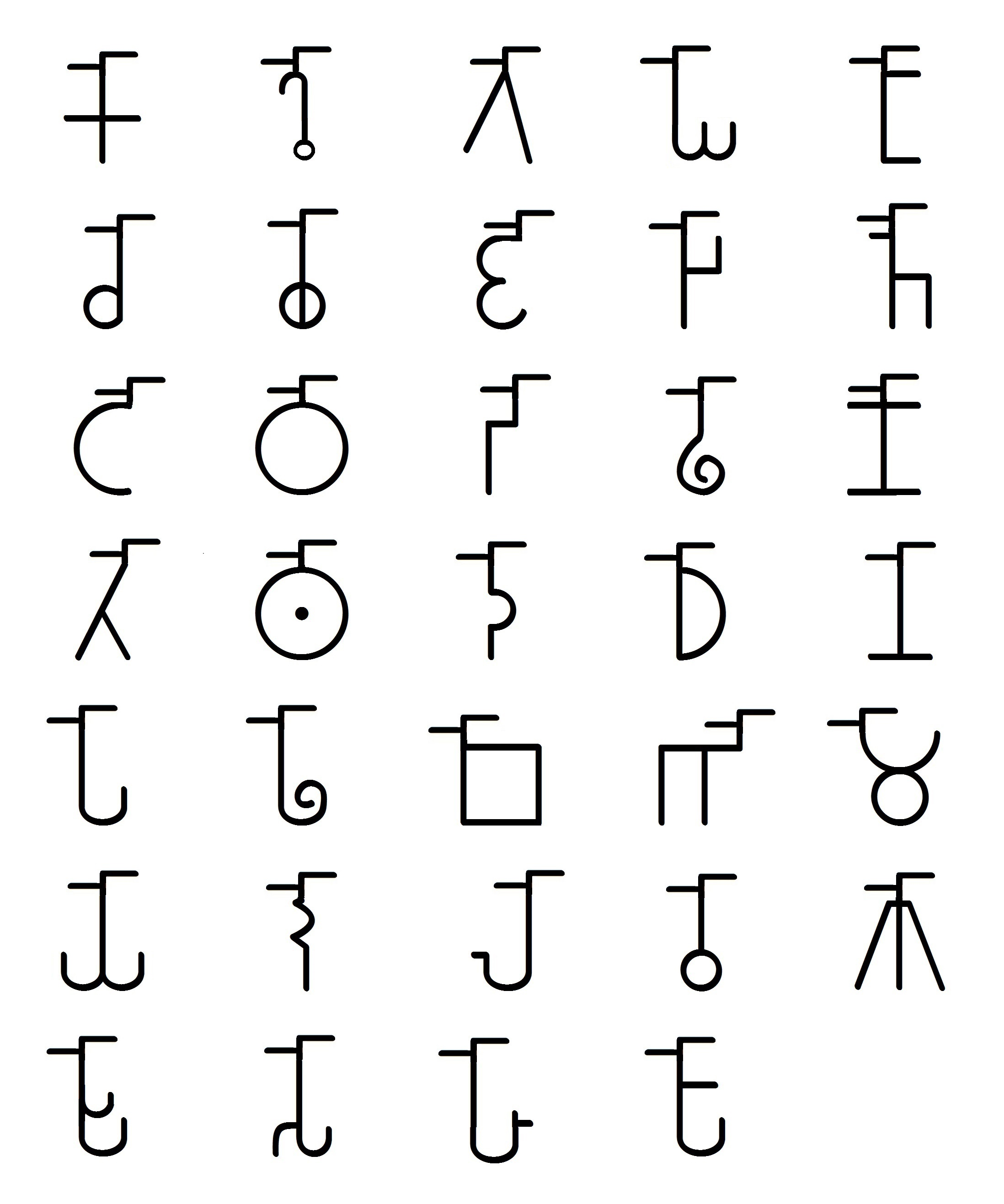 ब्राम्हि व्यंजनांचे ओ-कार